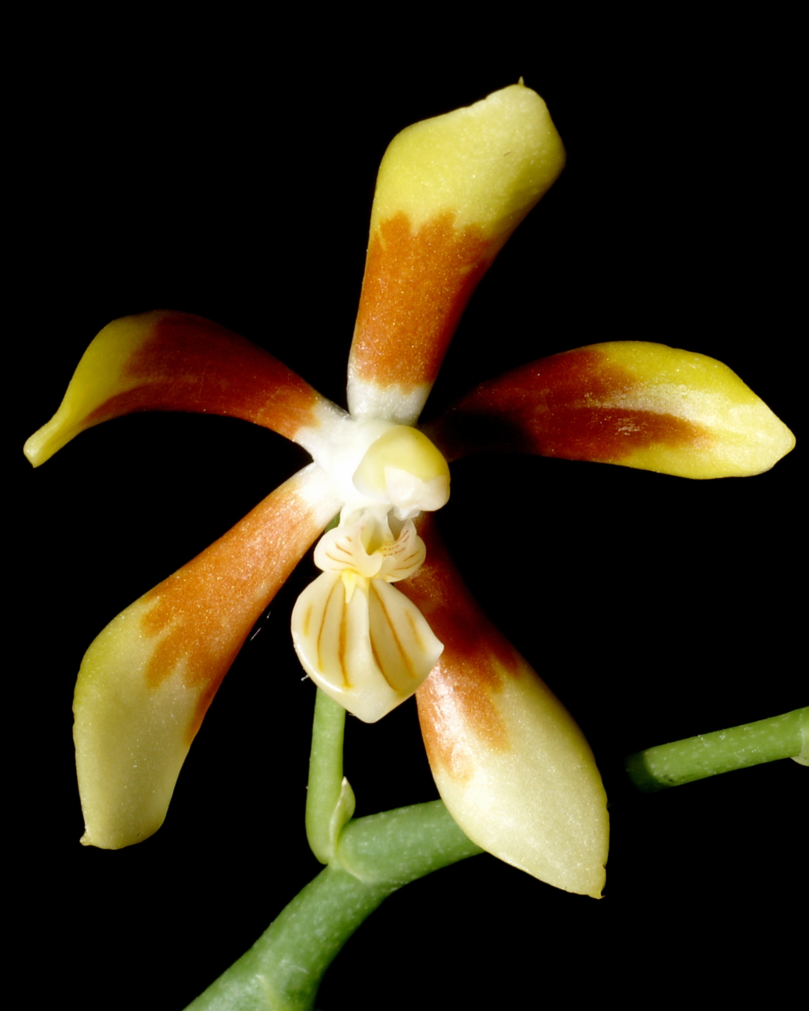 Phalaenopsis fuscata